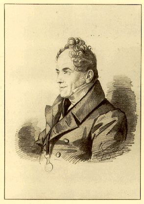 Кочубей Виктор Павлович